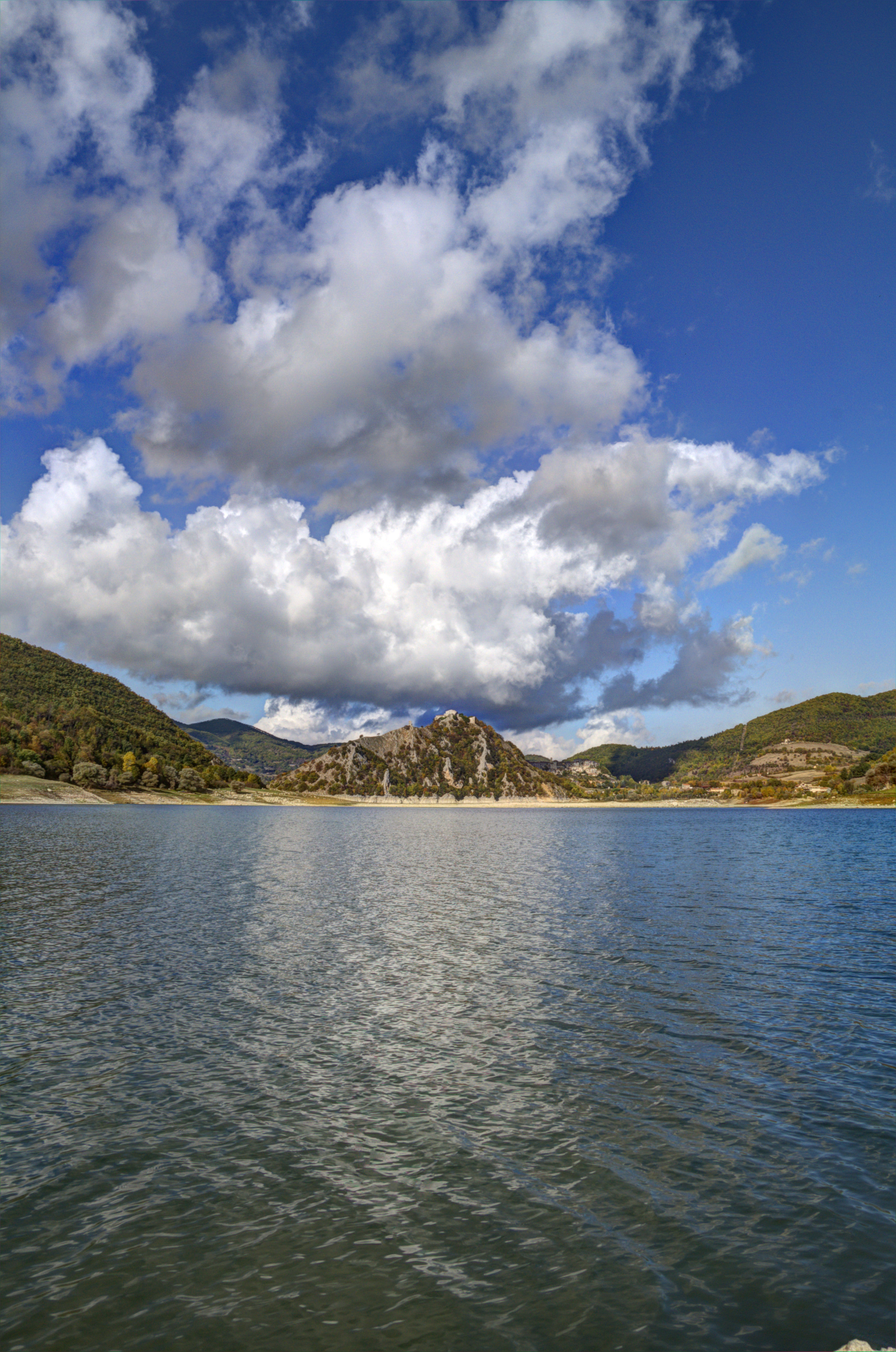 Lago del Turano. Al centro della foto sono visibili gli abitati di Castel di Tora e Colle di Tora.